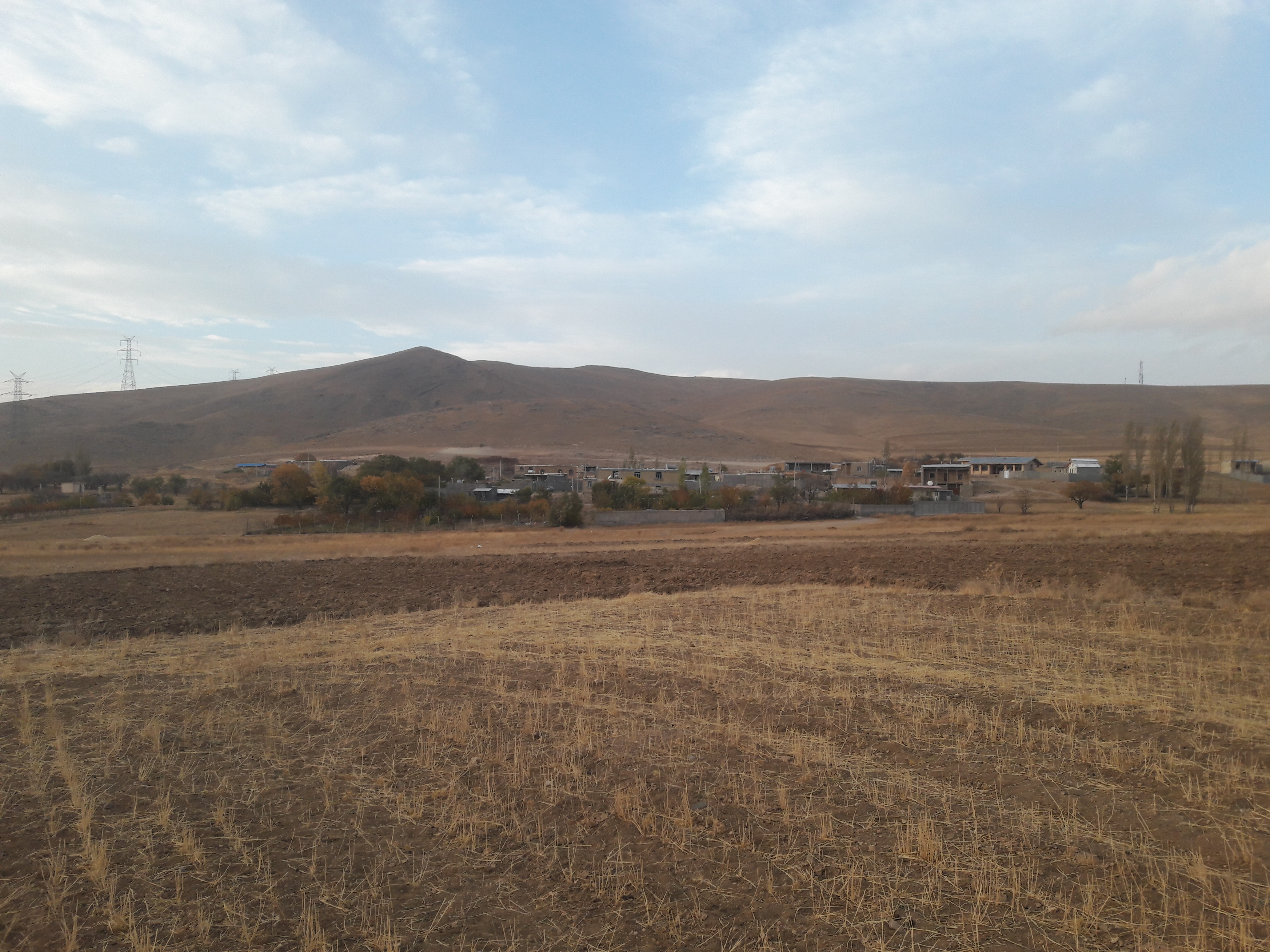 روستای یارکندی